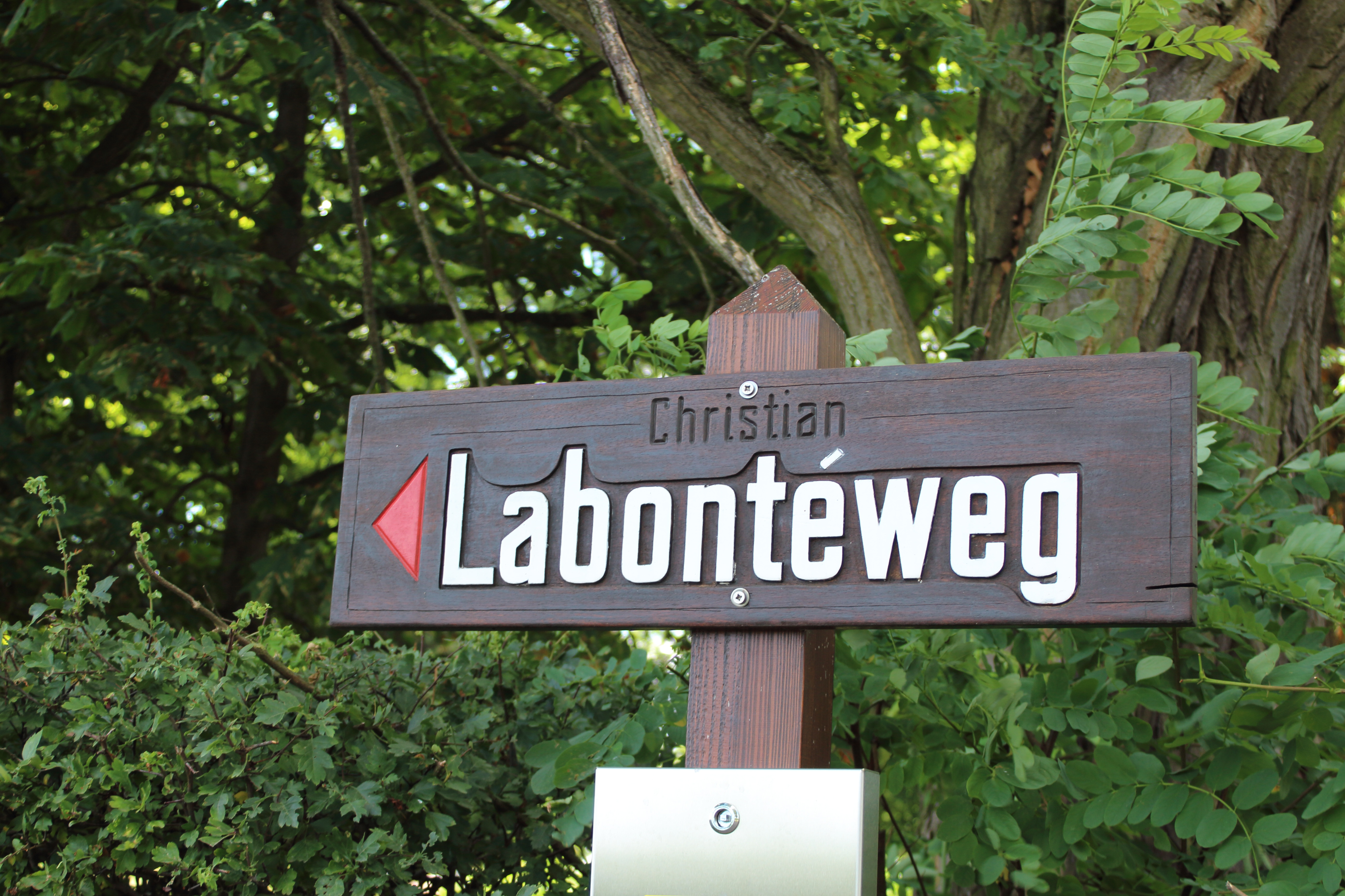 "Christian Labontéweg", Park Schloss Johannisberg im Rheingau. Christian Josef Labonté (1899-1992) war von 1924 bis 1956 Domänenrat auf Schloss Johannisberg, außerdem hessischer Politiker (CDU) und Abgeordneter des Hessischen Landtags.